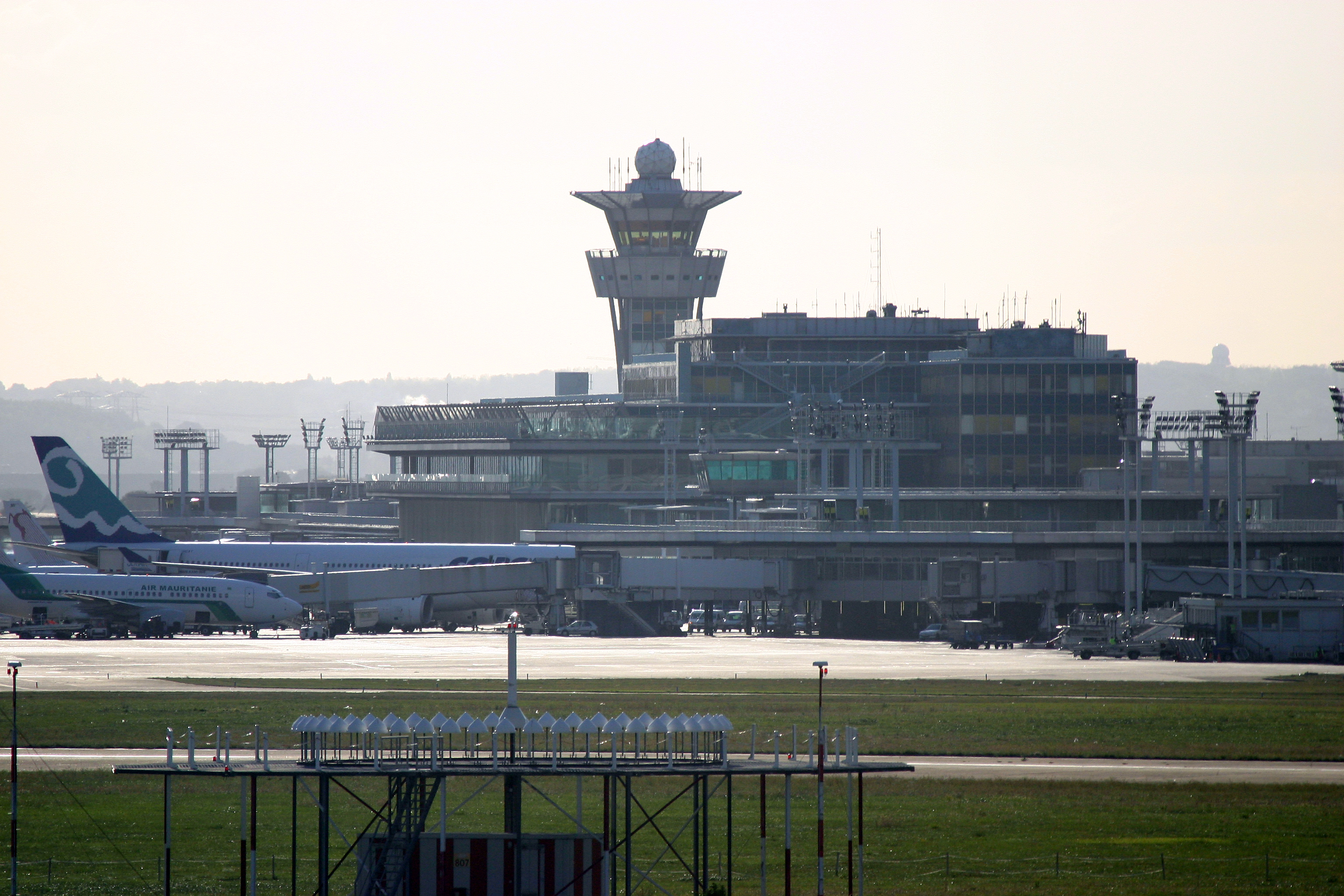 Vue de l'aérogare de Orly sud. On peut voie aussi la tour de contrôle de Orly avec le radome abritant un radar de sol. Au premier plan, on voit le VOR-DME de Orly.